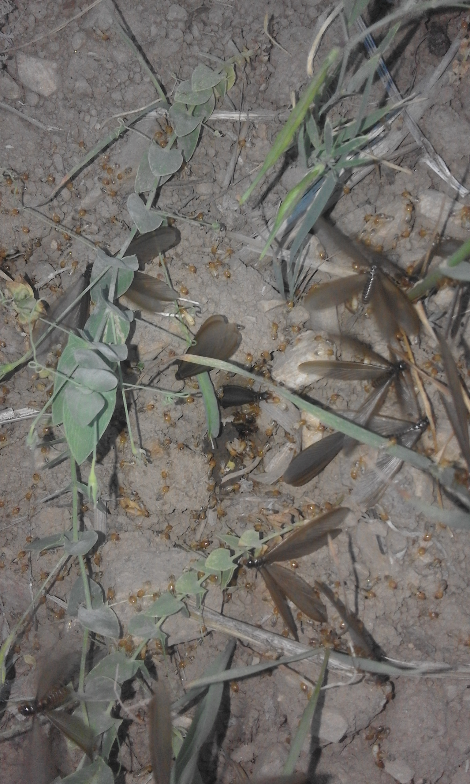 नेपाली: पखेटा निस्केको धमिरा